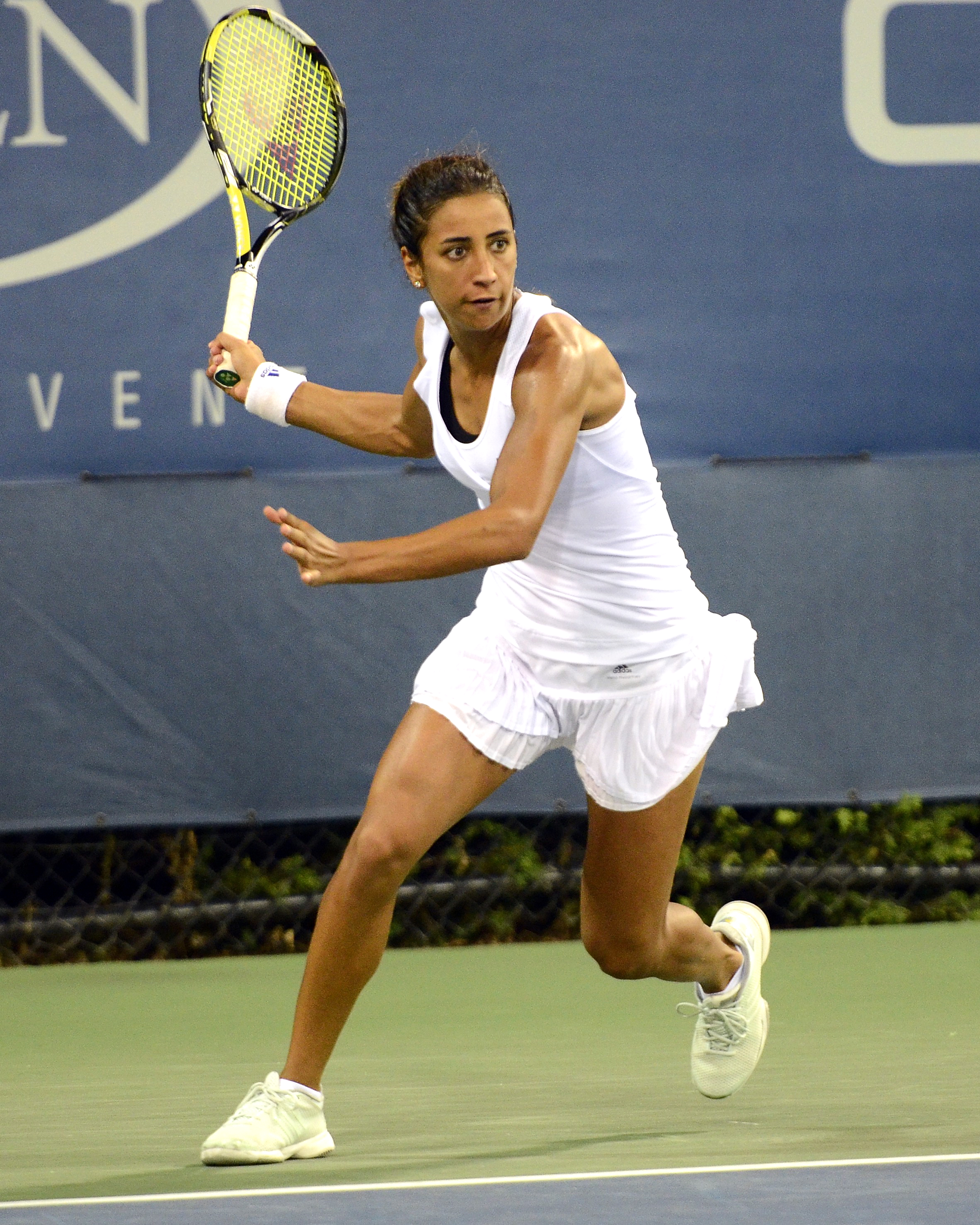 August 21, 2014 Queens, NY Misa Eguchi (JPN) def. Cagla Buyukakcay (TUR)